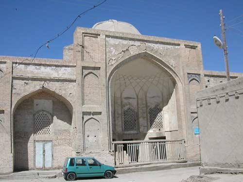 Бухара. Комплекс Ходжа-Зайнутдин